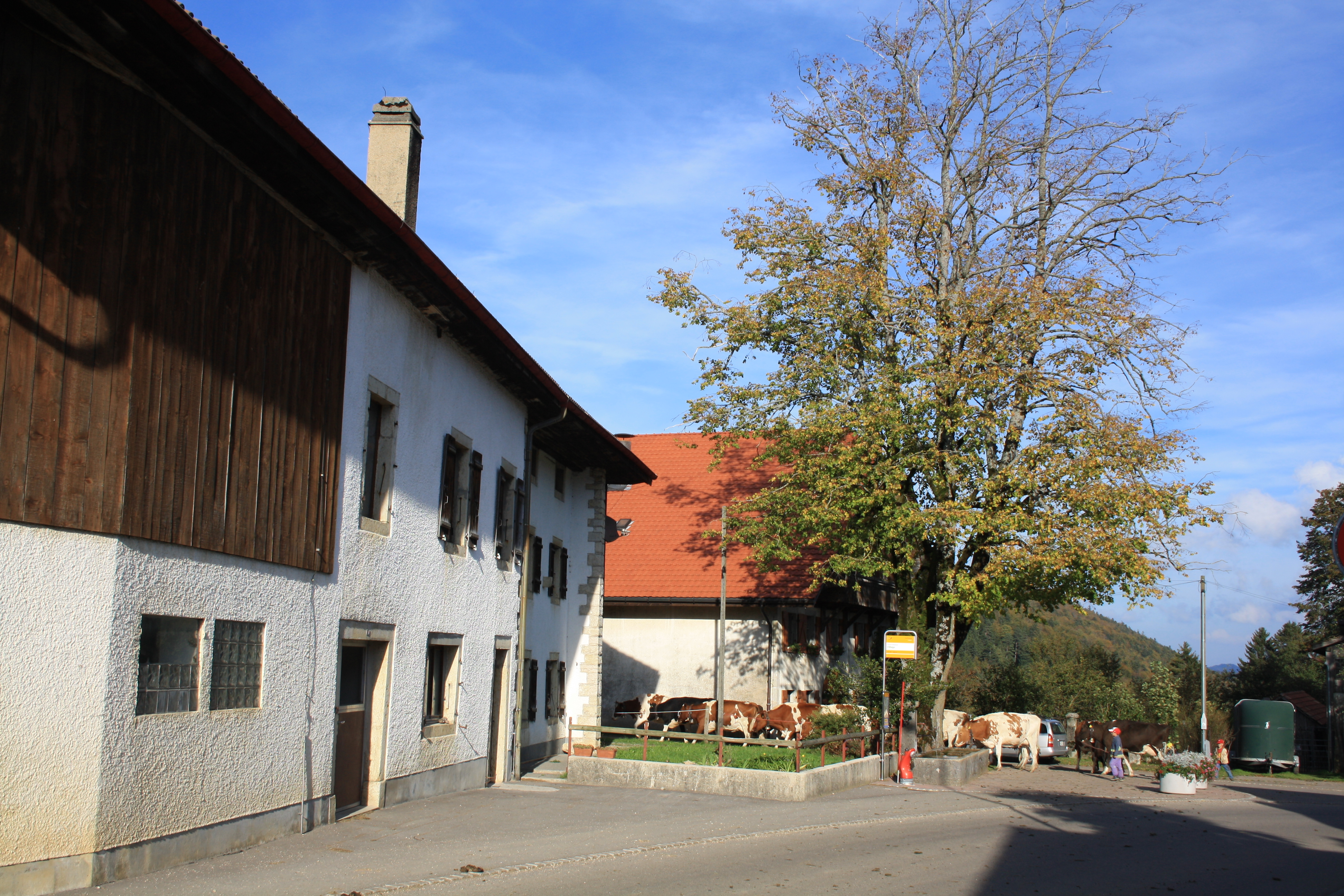 Fornet-Dessous